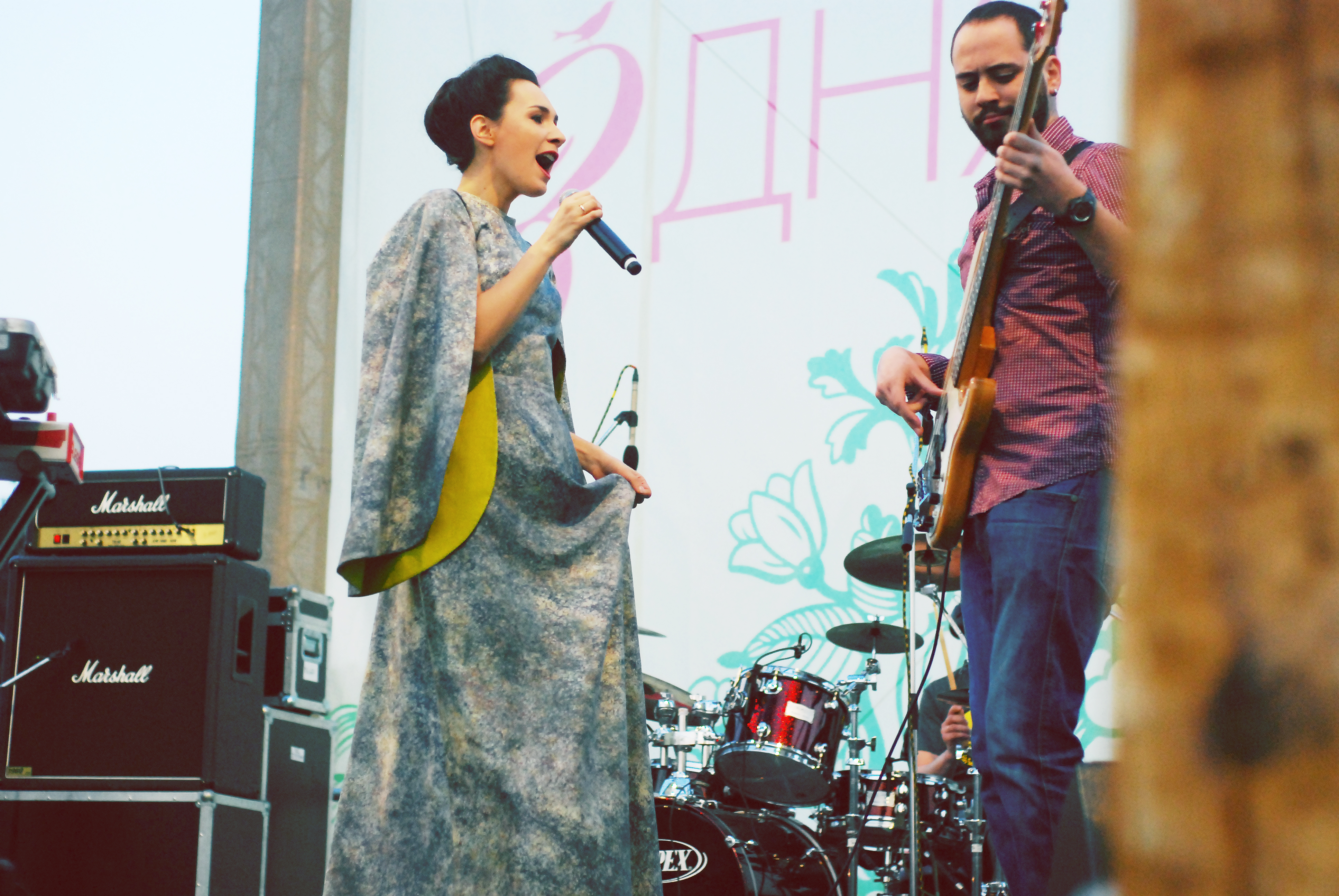 kryhitka / крихітка в ботанічному саду Гурт Крихітка